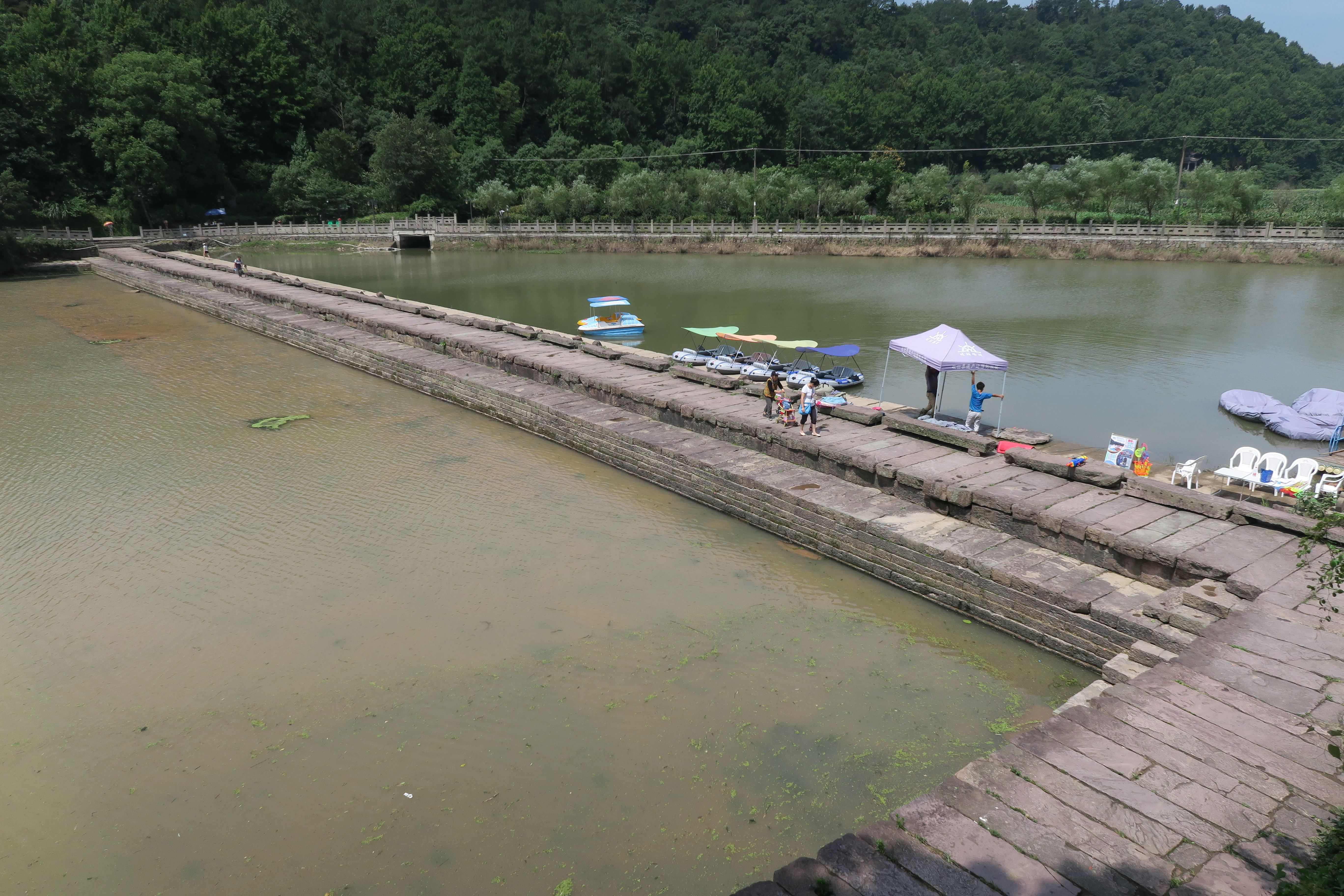 宁波鄞江它山堰